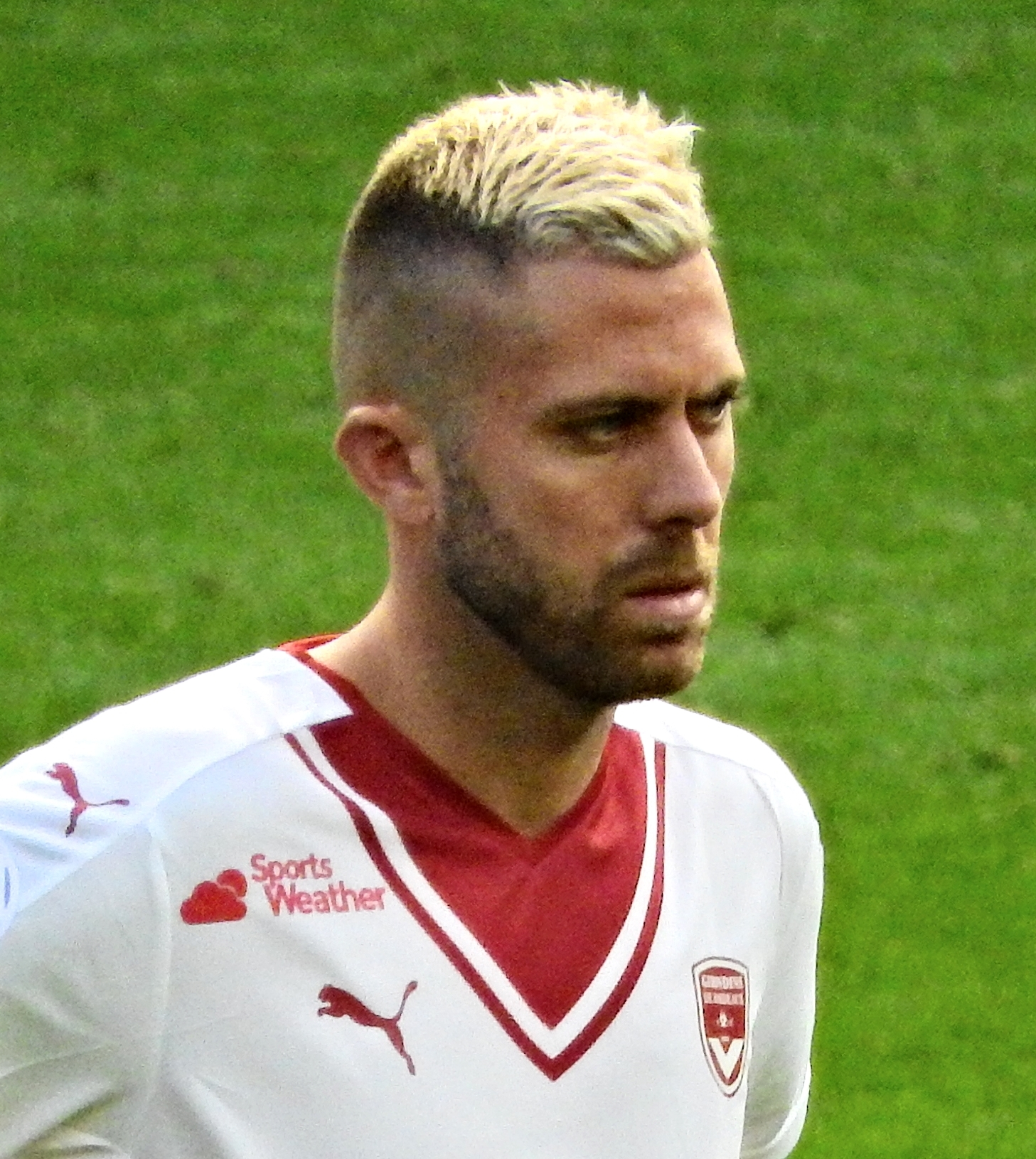 Jérémy Ménez lors de la rencontre opposant le Stade Rennais aux Girondins de Bordeaux le 16 octobre 2016 au Roazhon Park.